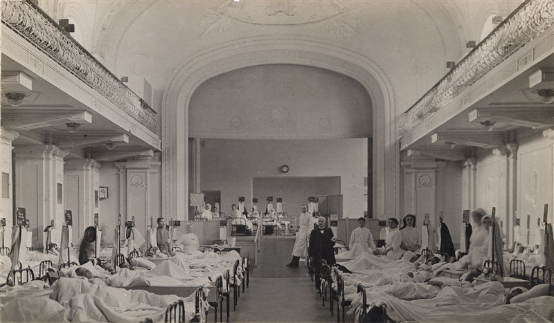 Ligoniai ir medicinos personalas Vilniaus miesto salėje, Aušros Vartų g. 5, įrengtoje ligoninėje. 1915-1917